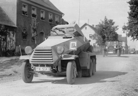 Herbstmanöver des IX. Armeekorps in der Bayrischen Ostmark 1935,Panzer-Spähwagen im Dorf Dürnast Information added by Wikimedia users.schwerer Panzerspähwagen Pz.Spw. (6 Rad) (Sd.Kfz. 231)